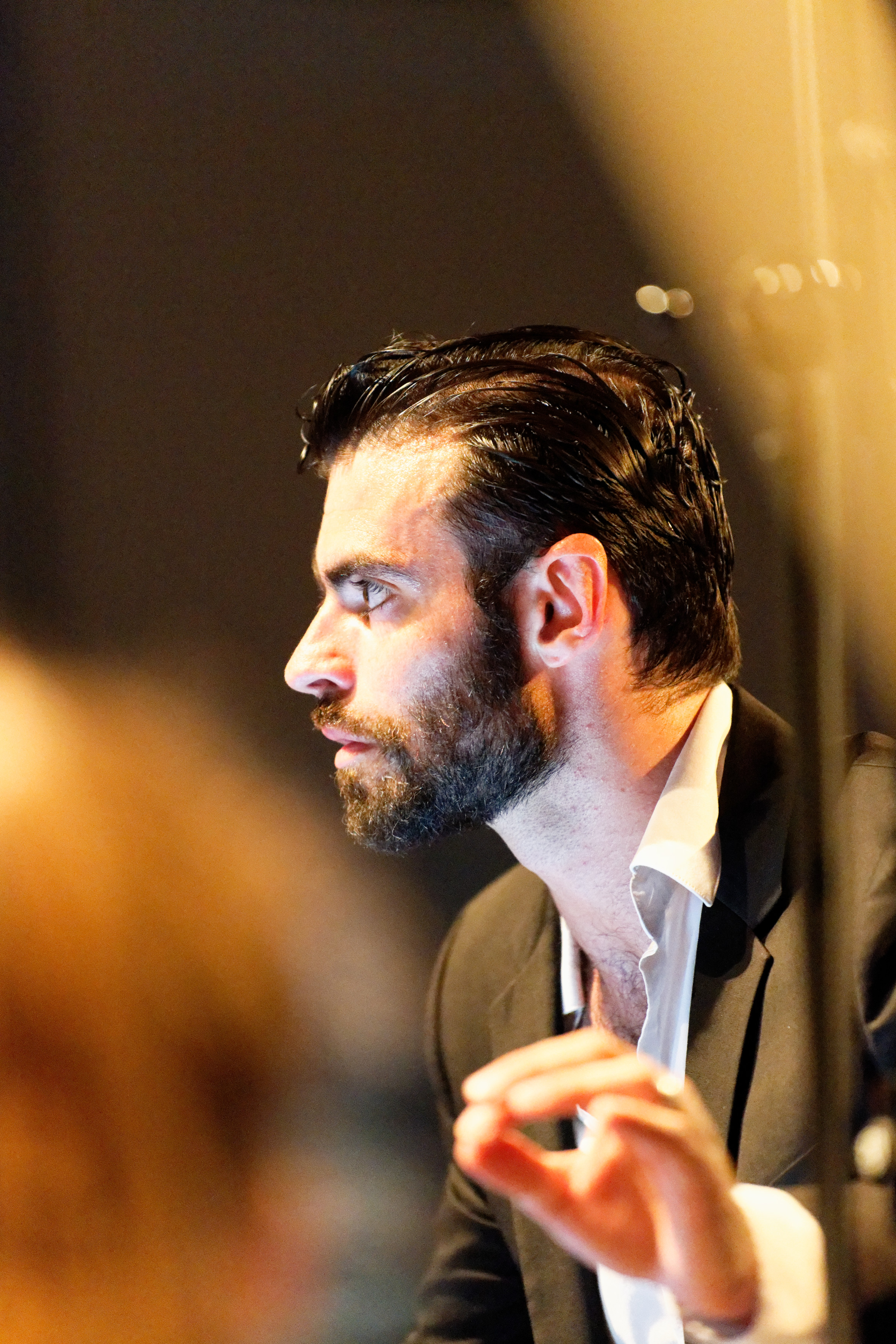 Benjamin Garzia dirigeant la Mahlerian Camerata dans la Septième Symphonie de Gustav Mahler, aux Chorégies d'Orange